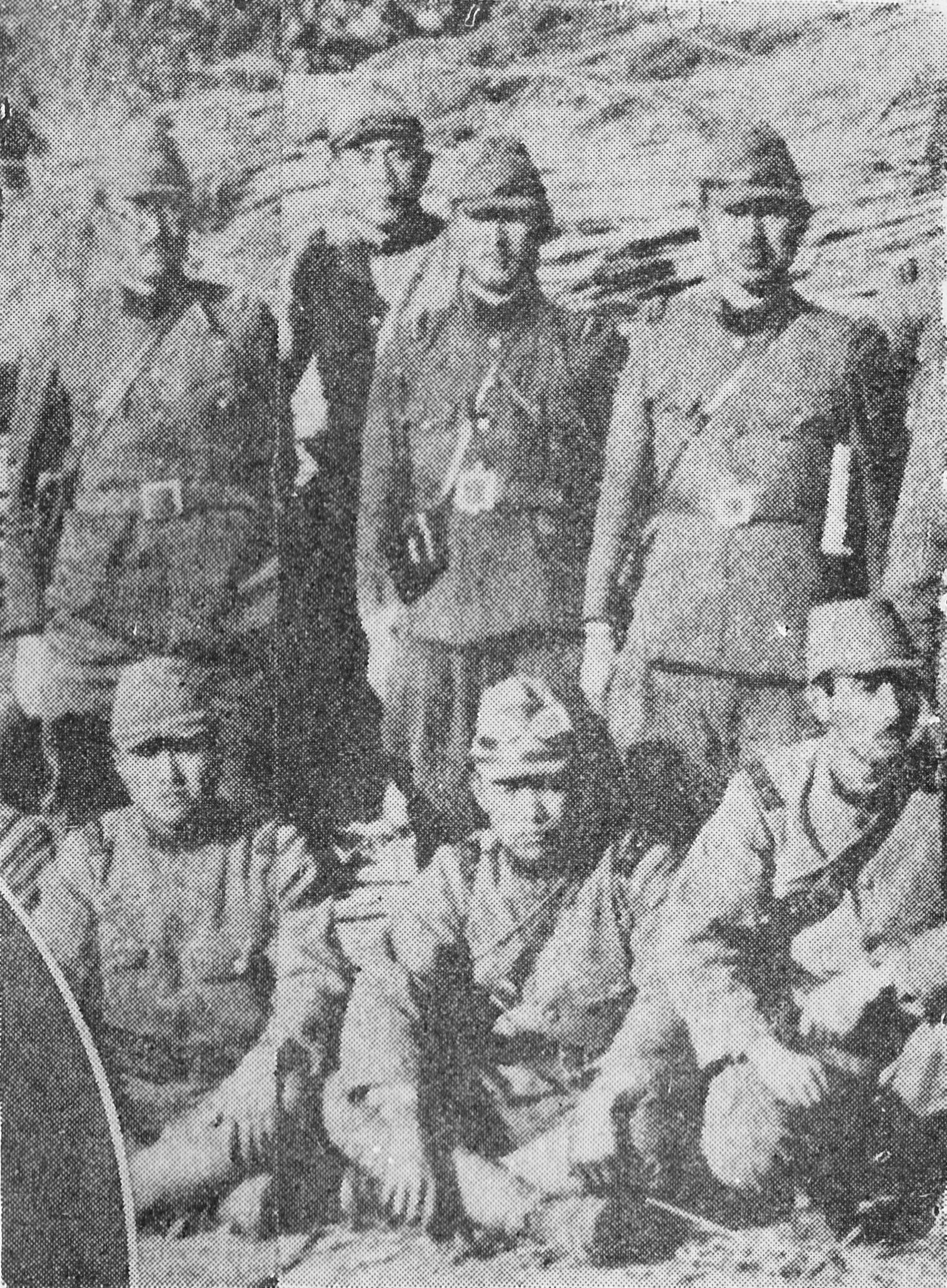 西住小次郎大尉最後の記念写真（右から2人目）。左端は細見中佐。